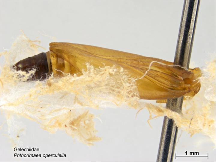 Phthorimaea operculella, cocoon